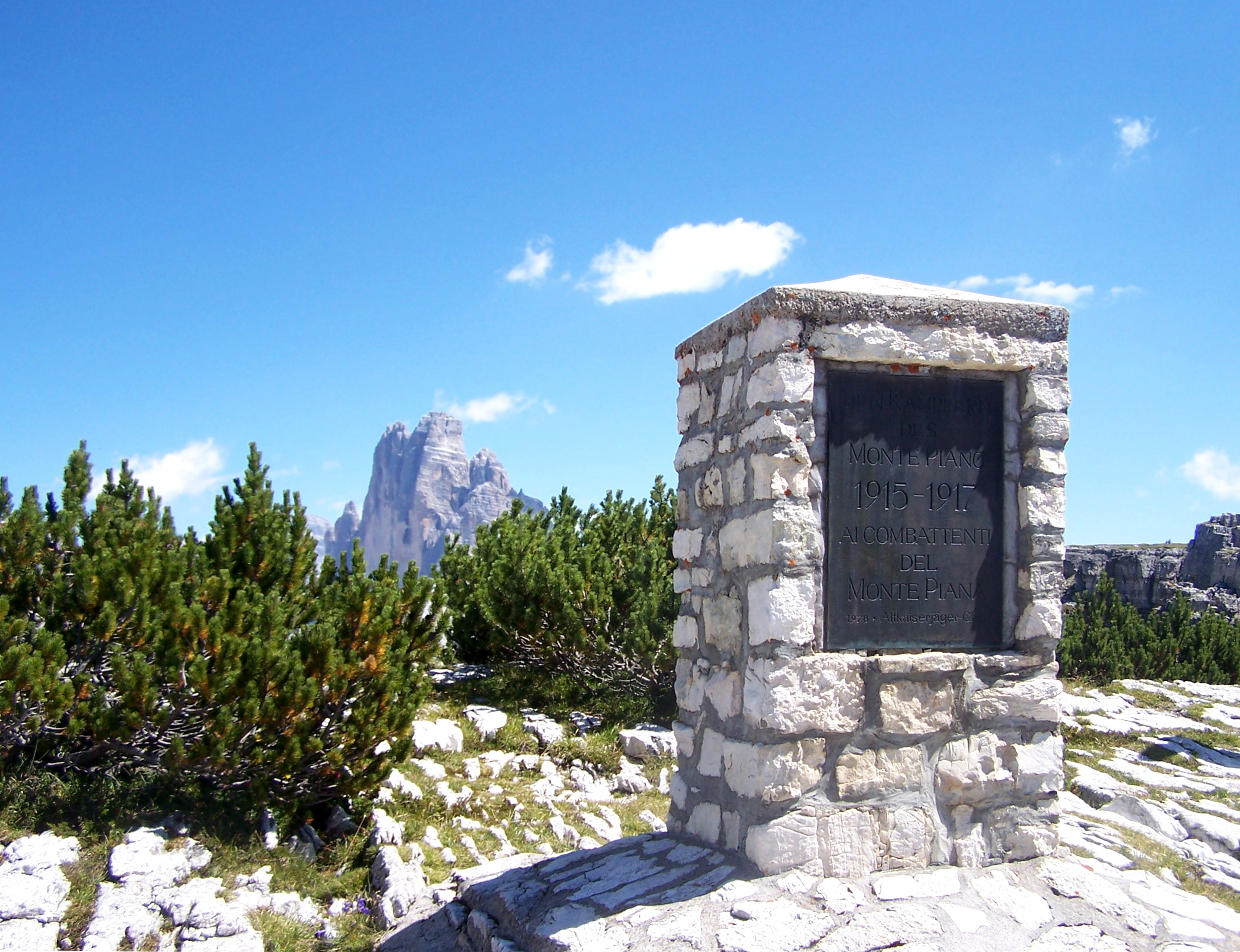 Denkmal des Altkaiserjägerclubs auf dem Monte Piano, im Hintergrund die Drei Zinnen